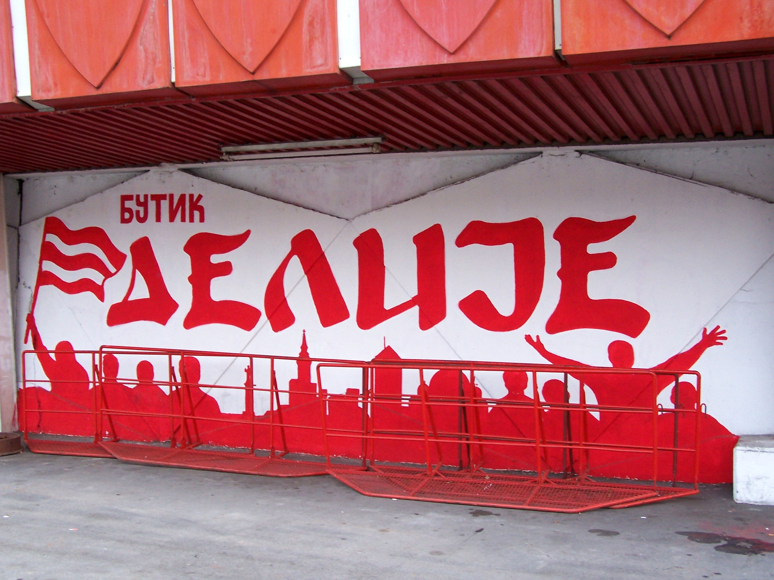 Butik Delije mural at Stadion Crvena Zvezda in Belgrade